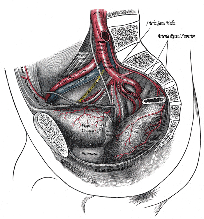 Arteria rectal media y otros